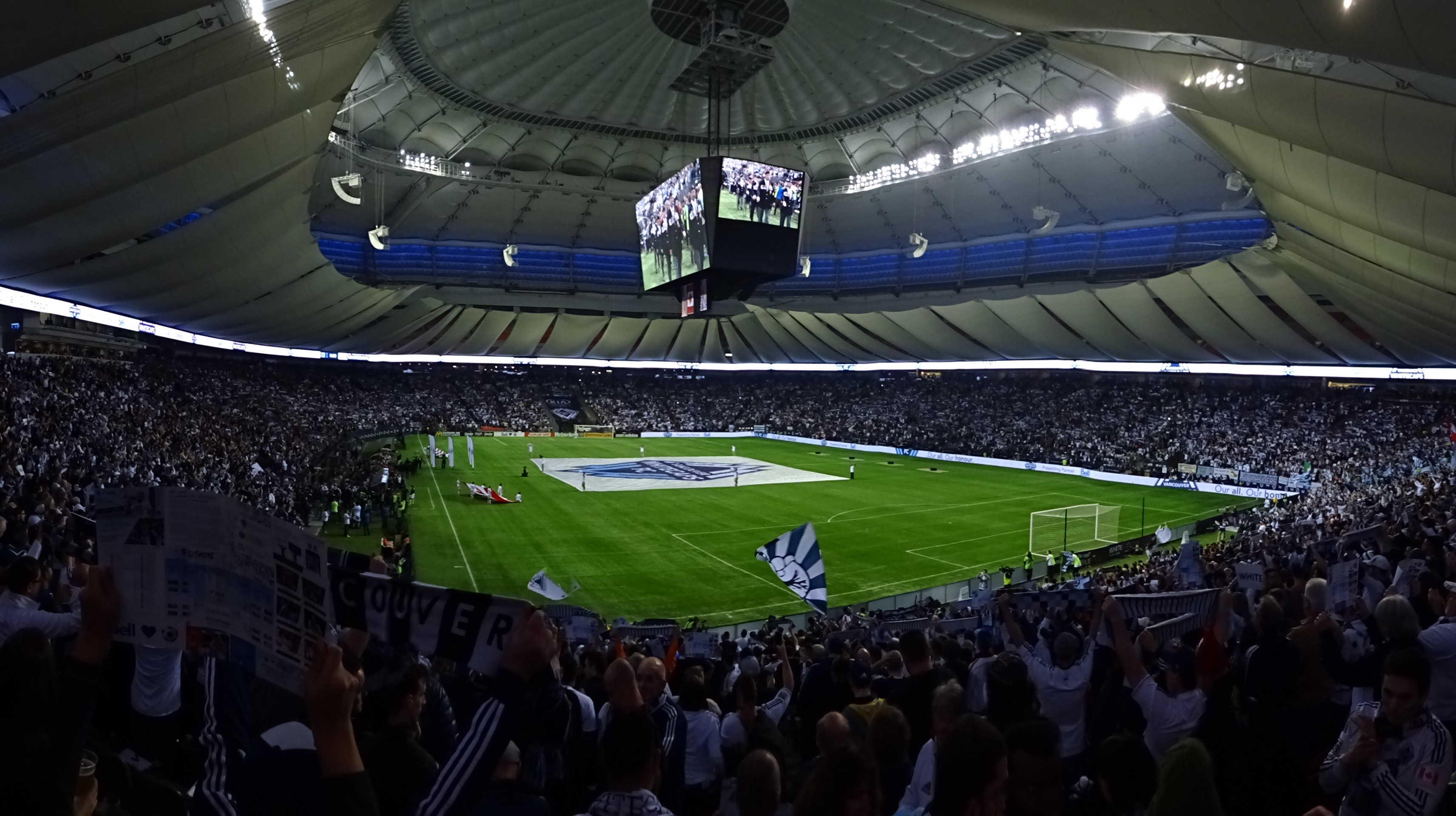 Van vs Por, 8-Nov-2015